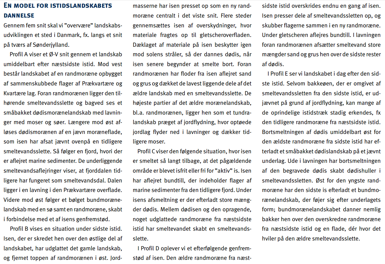 Beskrivelse til fil: Geoviden 2005-2-side15.jpg